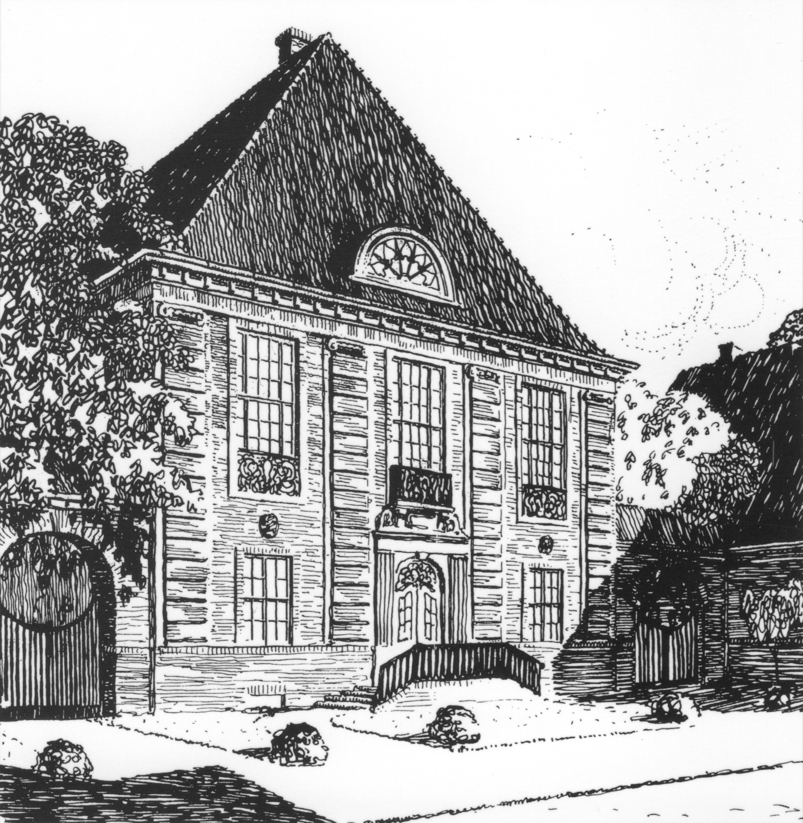 Kreishaus Segeberg